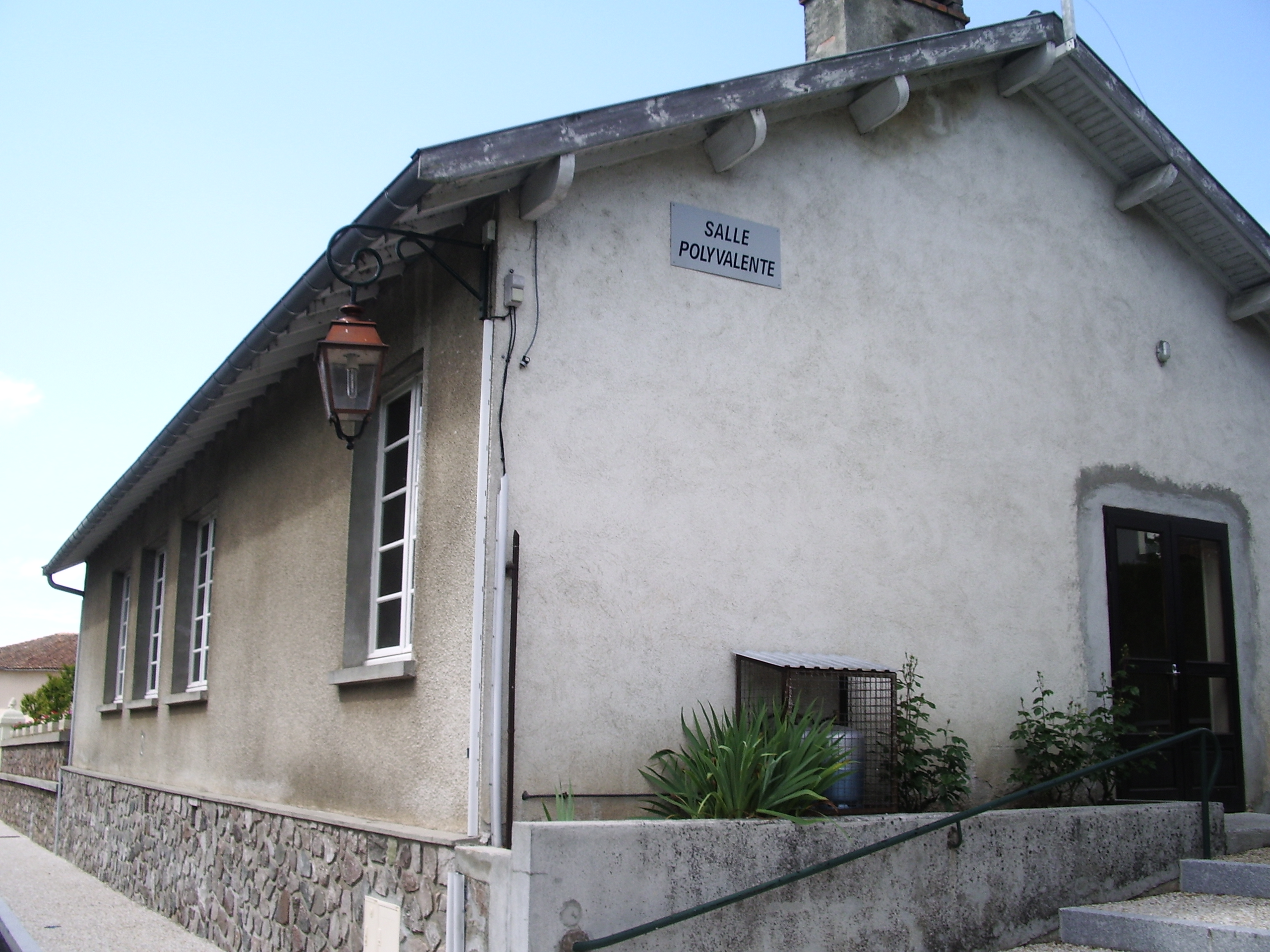 Salle des fêtes de la commune de Pressignac (Charente, France)